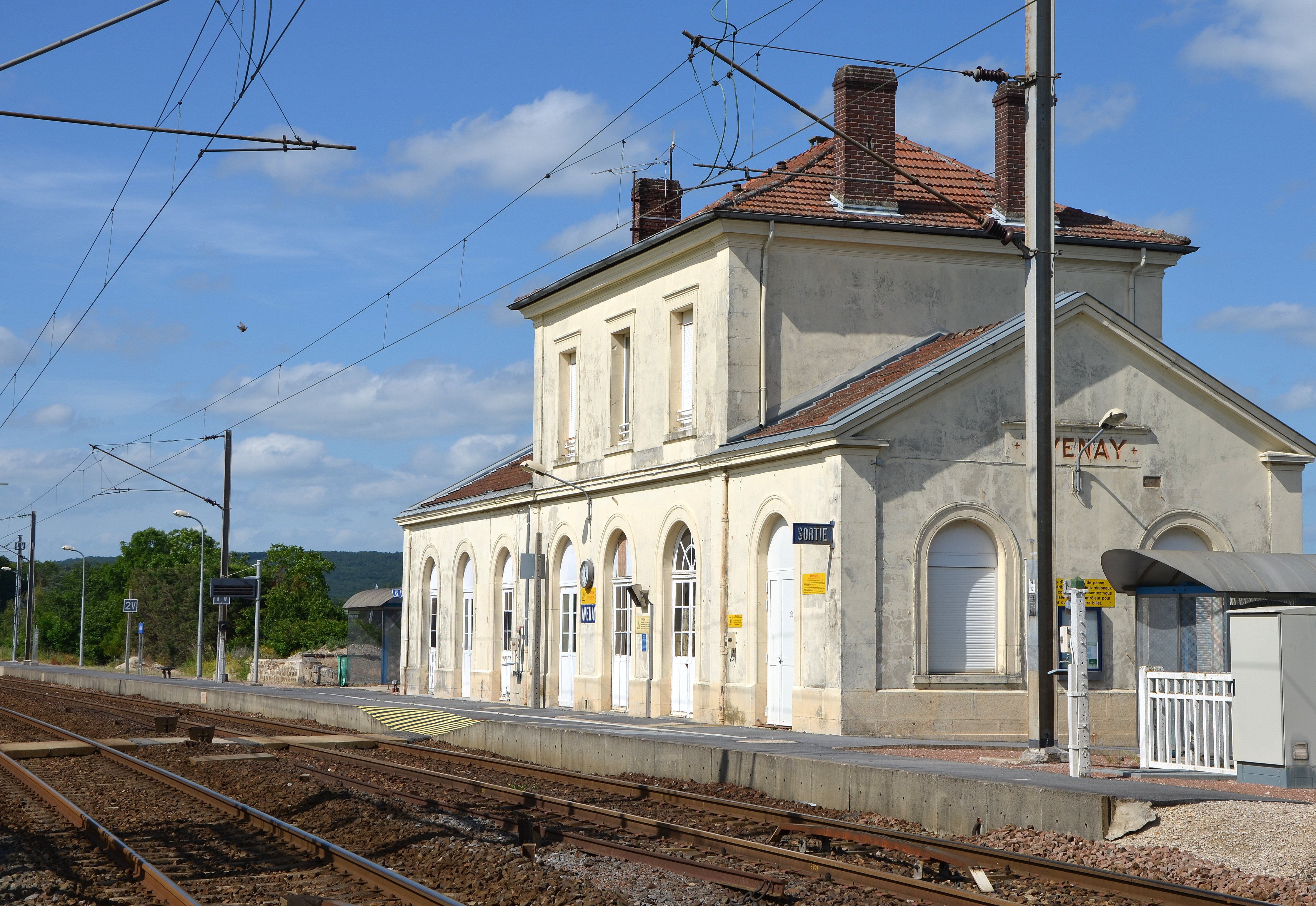 Gare d'Avenay sur la ligne Epernay Reims, Marne, France